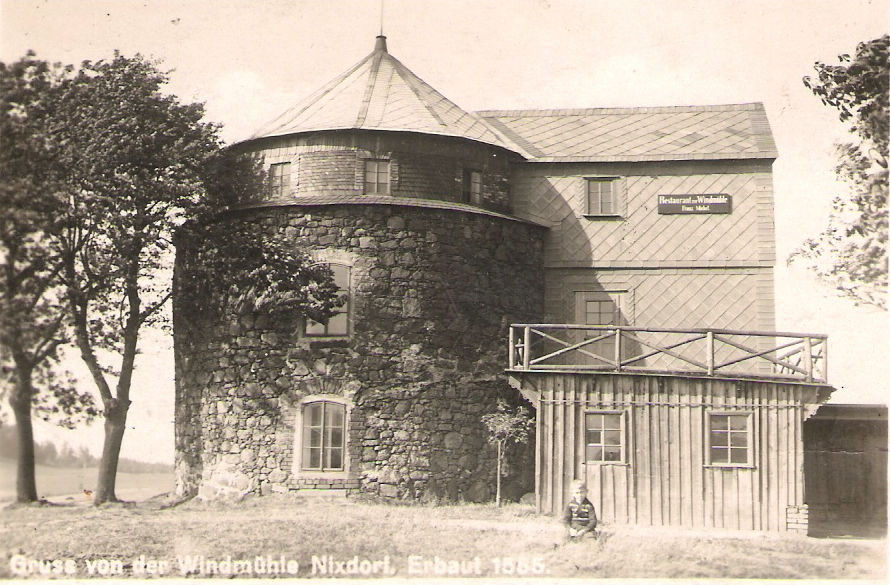 Pohlednice s fotografií větrného mlýna v Mikulášovicích, počátek 20. století